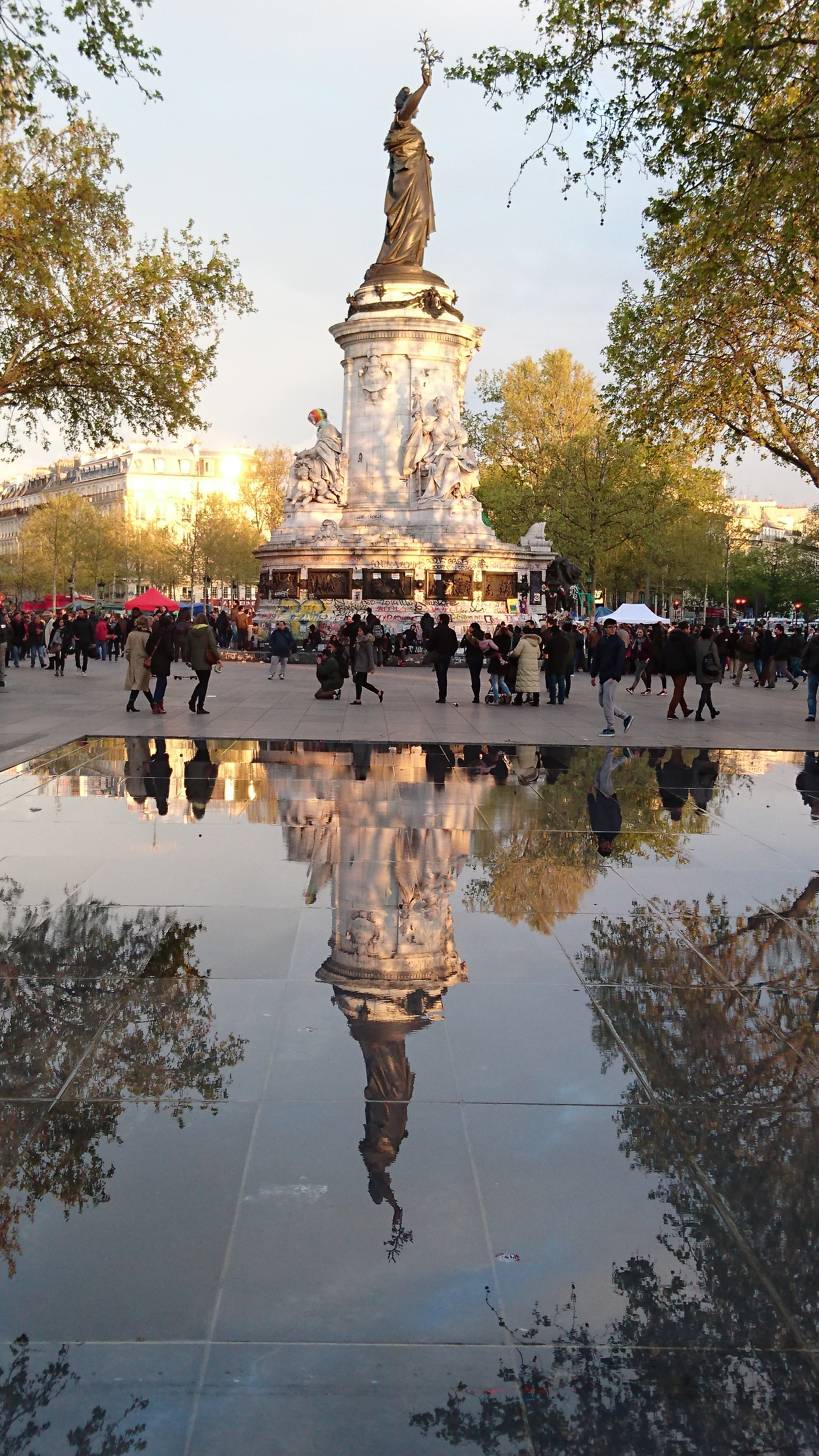 Marianne et son reflet